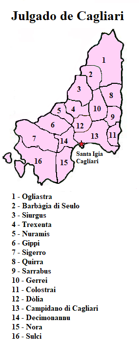 Mapa do Julgado de Cagliari, com curadorias ressaltadas segundo os nomes dispostos em Casula (1998) baseado em mapa do usuário Mario1952.